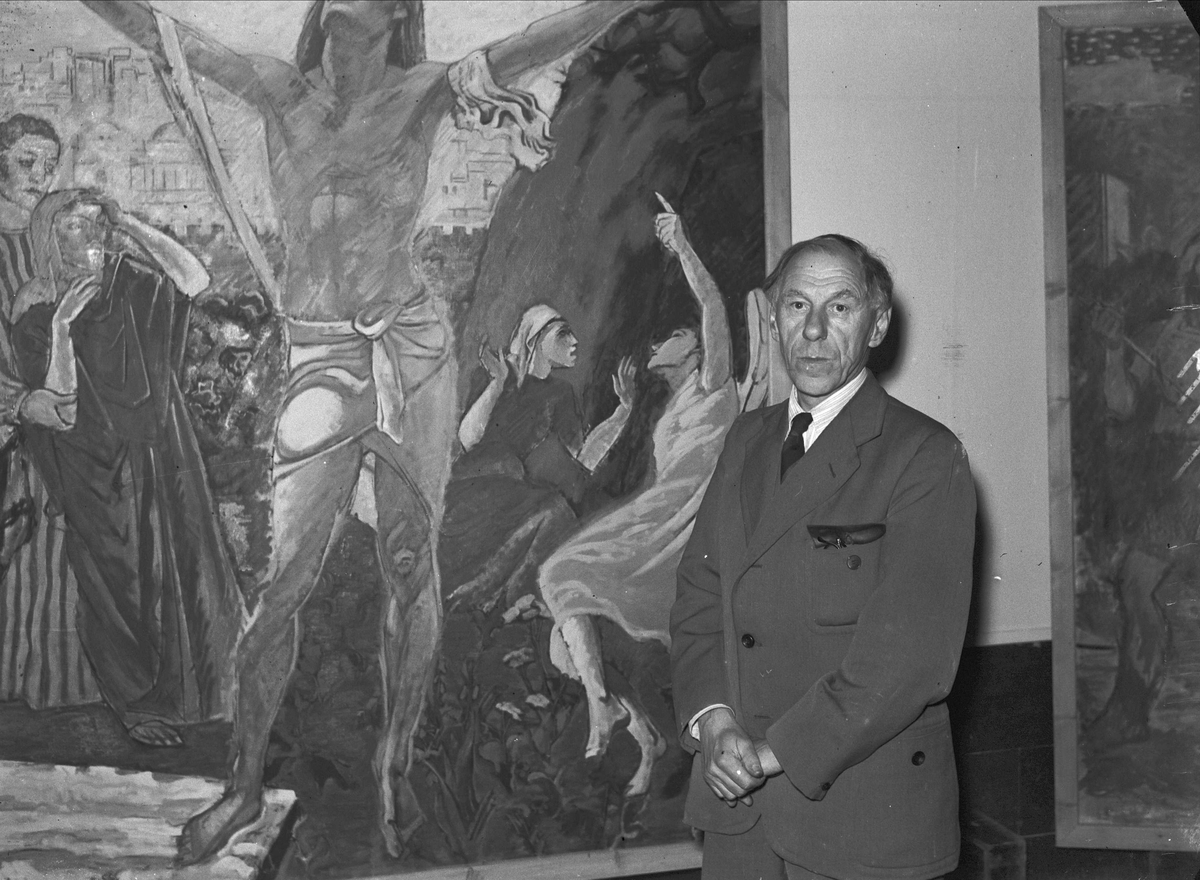 Axel Revold i Kunstnerforbundet: Foto: Leif Ørnelund, september 1946. Fra Byhistorisk samling hos Oslo Museum.